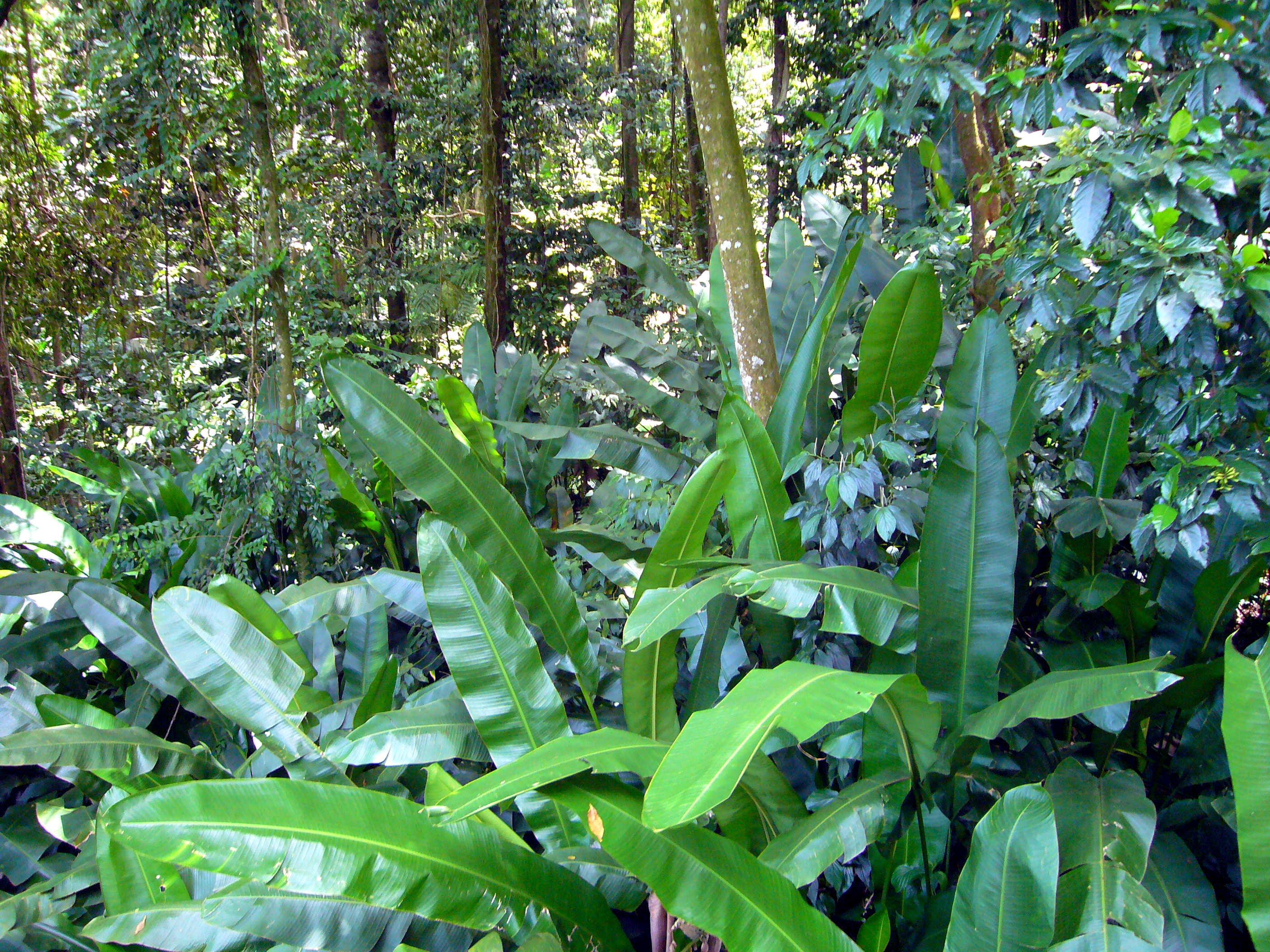 Babonneau, St Lucia, Rainforest